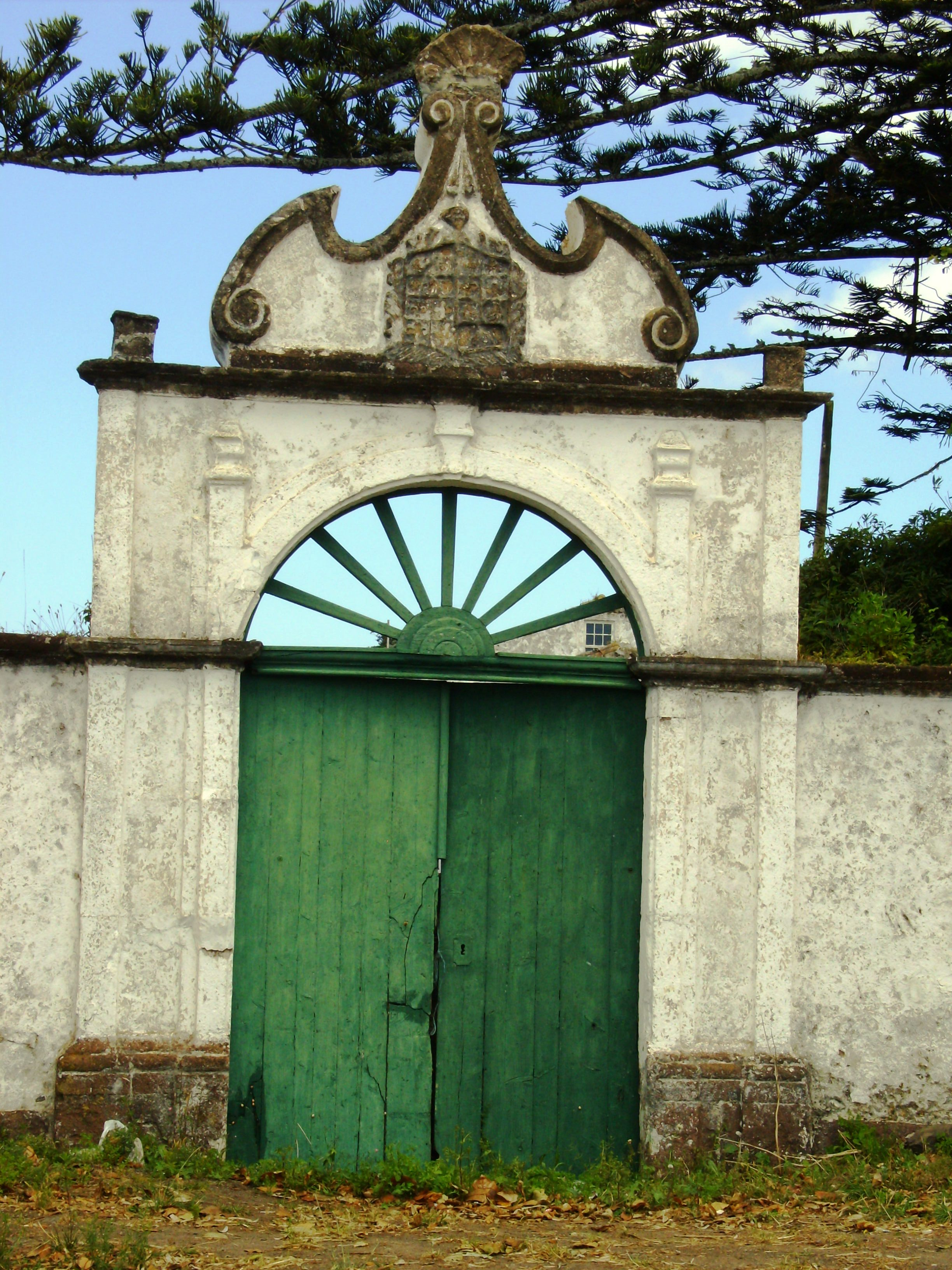 Ermida de Nossa Senhora do Monte, Ilha de Santa Maria (Açores), Portugal: portão da quinta.